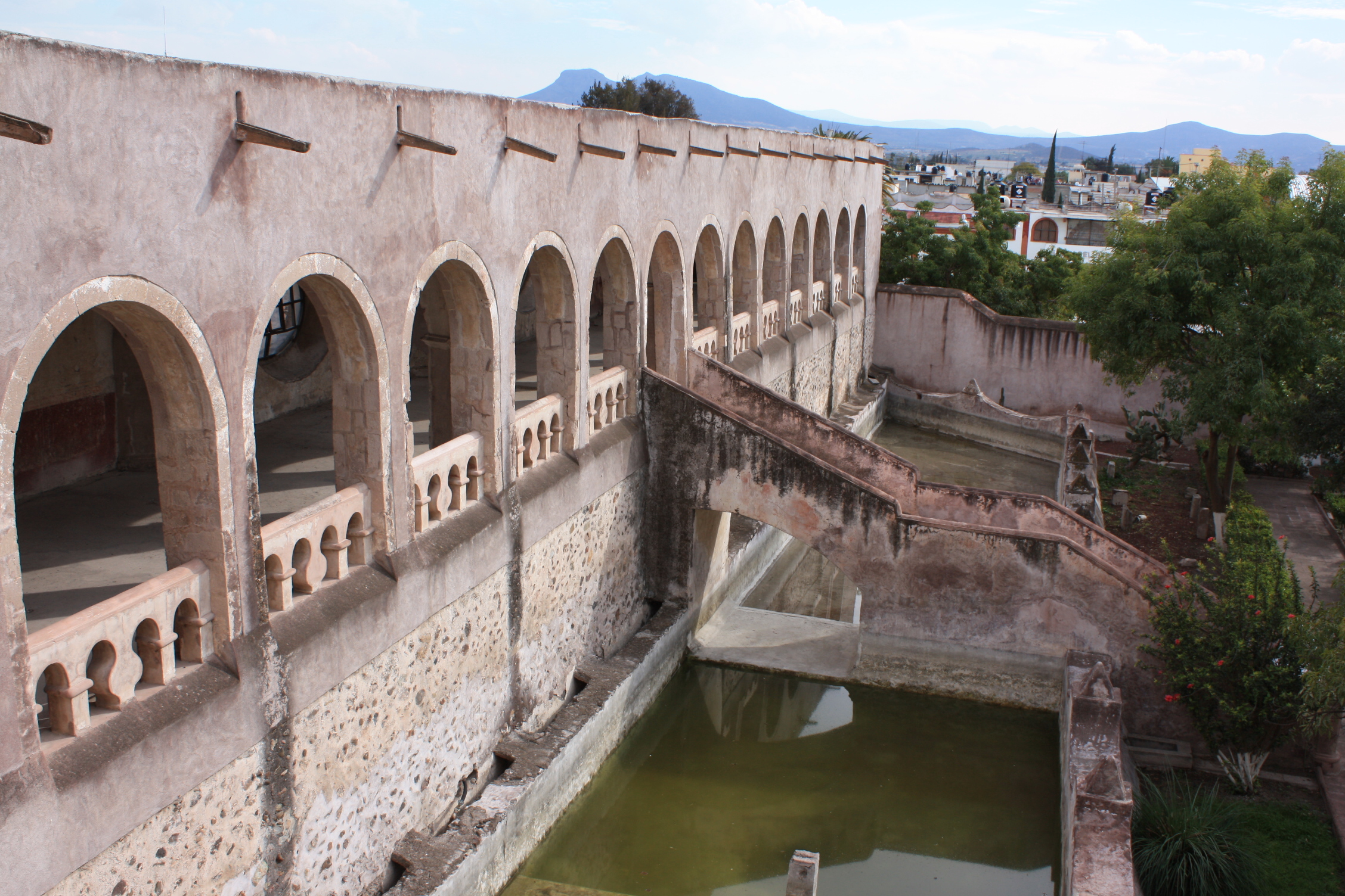 Convento de Actopan